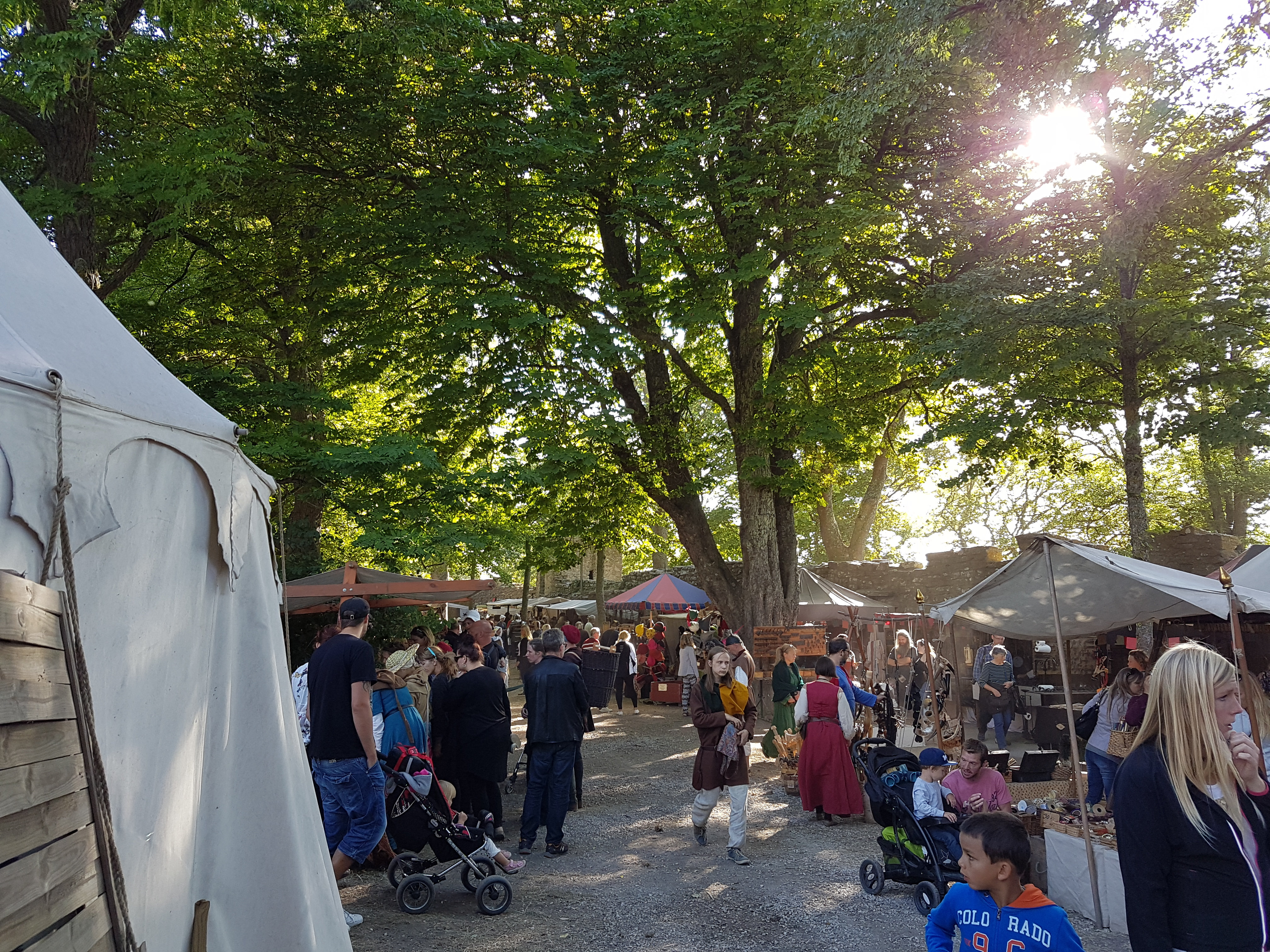 Marknaden.